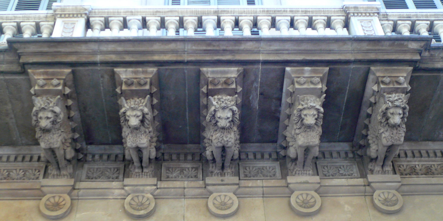 Casa Elizalde (Barcelona)